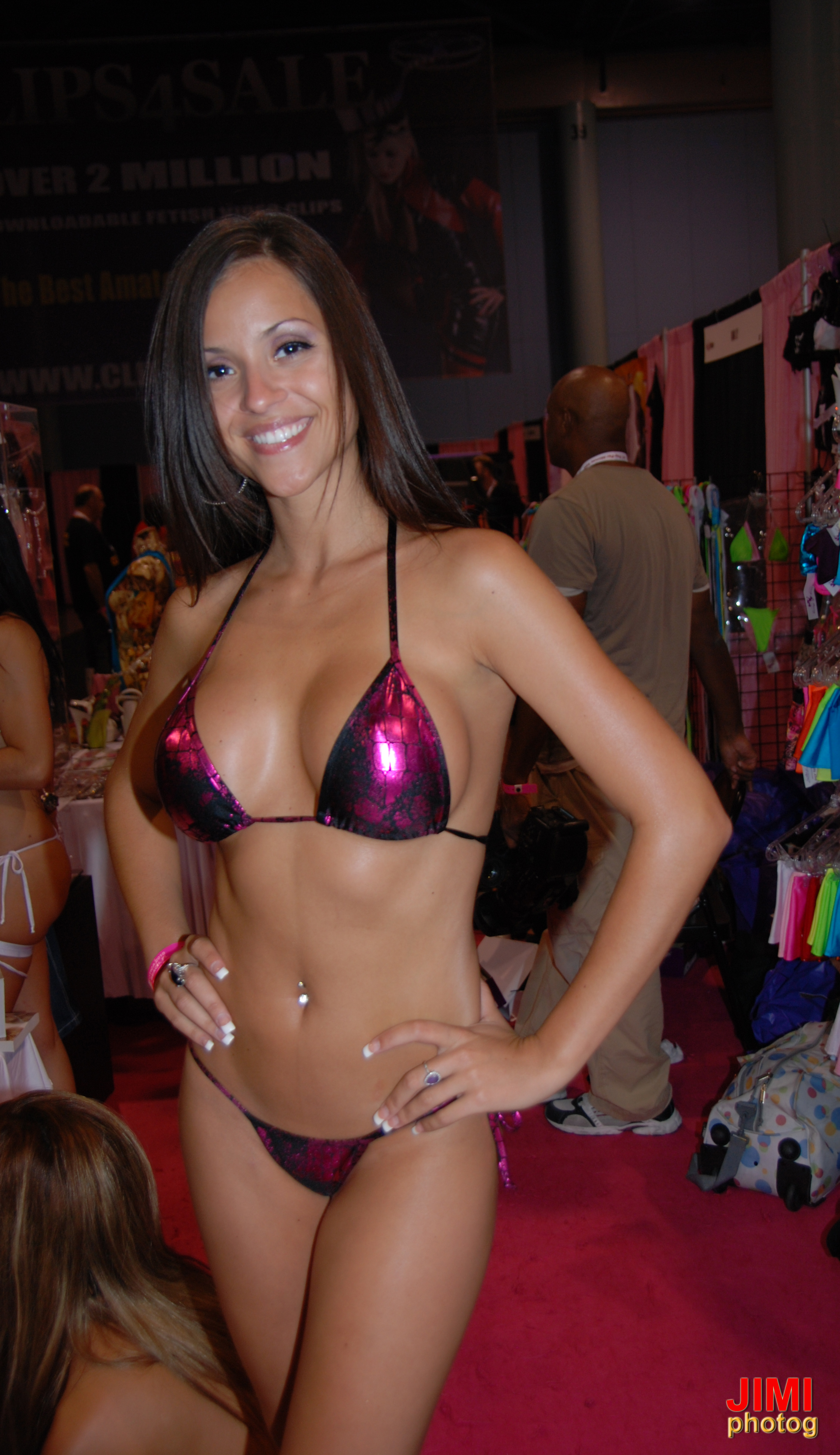 Janessa Brazil